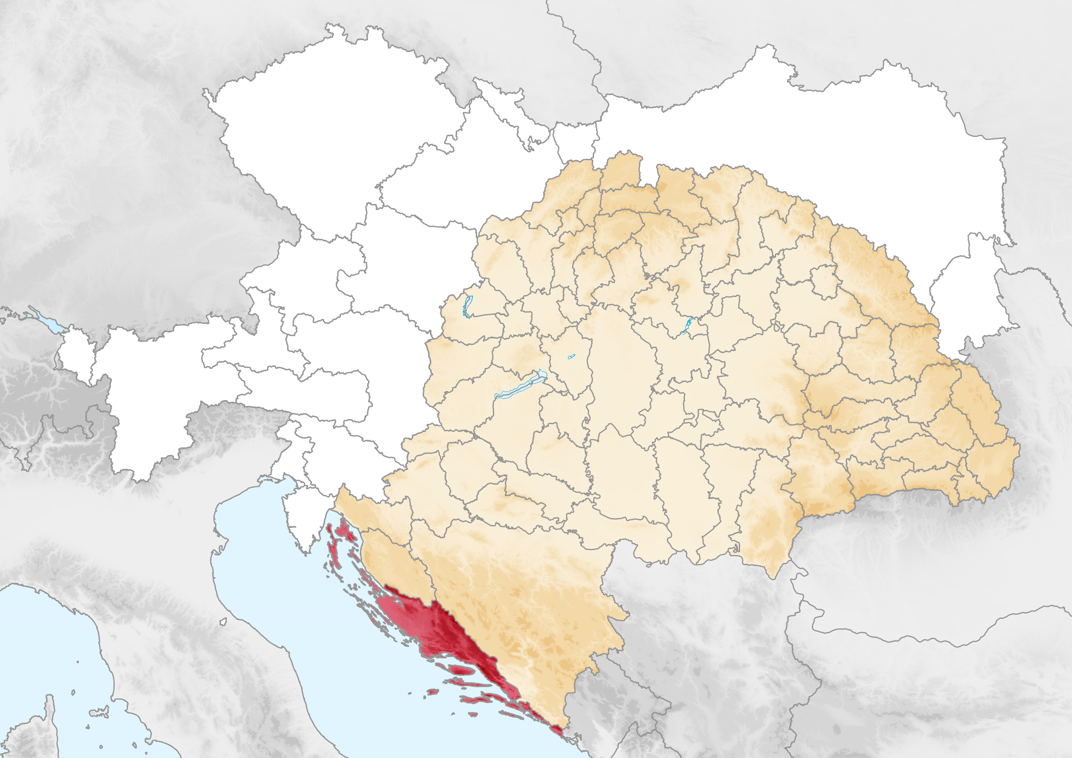 Carte de la Dalmatie dans l'empire d'Autriche (1914)